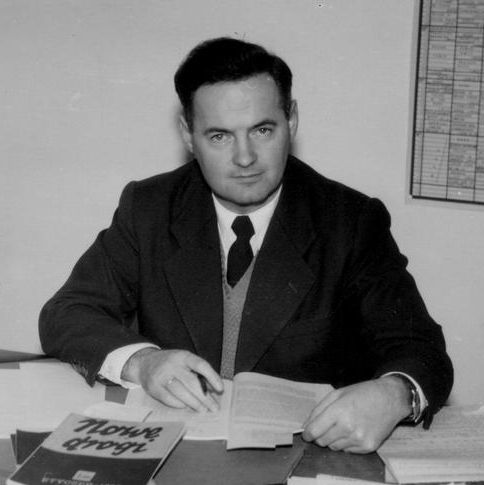 Tadeusz Chciuk-Celt, redaktor i zastępca dyrektora Rozgłośni Polskiej Radia Wolna Europa.